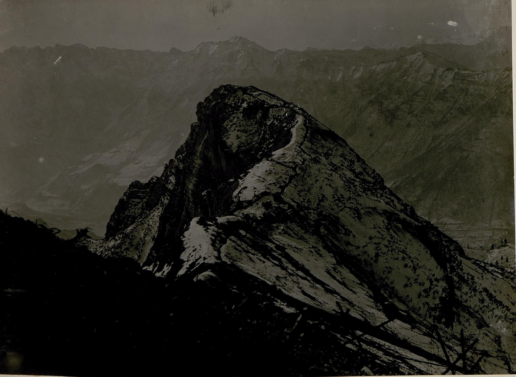 Der Corno-Gipfel von ¤ 1801.